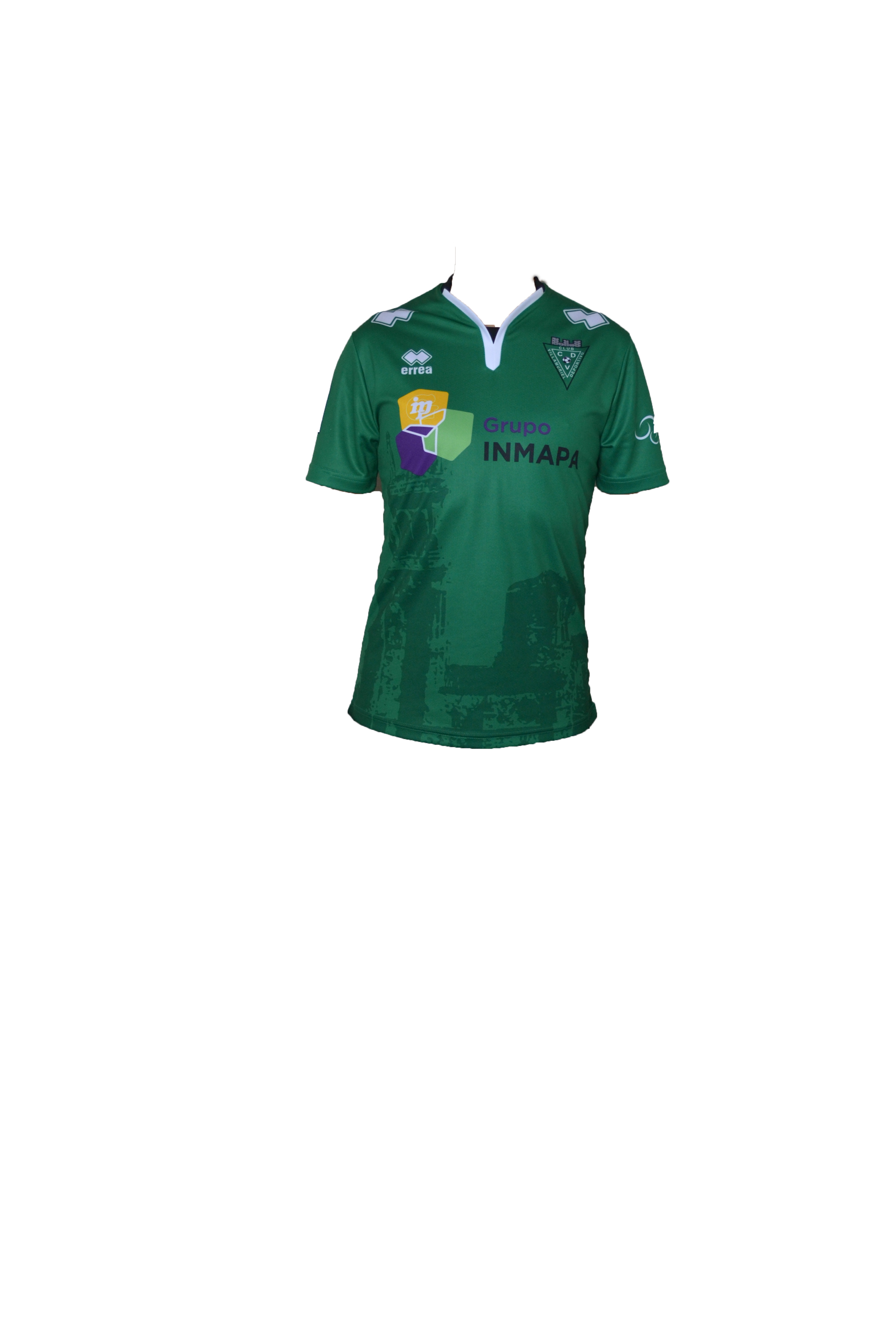 Verde con detalles en Negro y Blanco en la que destaca nuestro monumento mas preciado he imagen de nuestro pueblo, Villamuriel de Cerrato.En la parte delantera (Abajo) La iglesia de Santa María la Mayor del Siglo XIII con el escudo en el lado del corazón y nuestro patrocinador en el centro,en los hombros el logo de la marca deportiva errea,en la manga derecha el parche de Proliga y la manga izquierda irá la publi de la tienda de deportes dibo.En la parte trasera arriba con las banderas que representamos, la de la provincia de Palencia y la de Castilla y León justo debajo Diputación de Palencia seguido del dorsal en el centro y debajo el eslogan turístico de Vive Villamuriel.